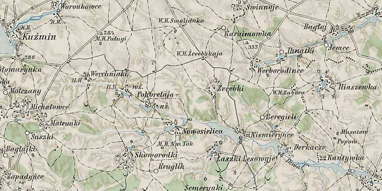 Pohoryła Wyższa. Mapa wojskowa Austro-Węgier. Mapa geograficzna Europy Środkowej (1: 200 000). 1910 r.